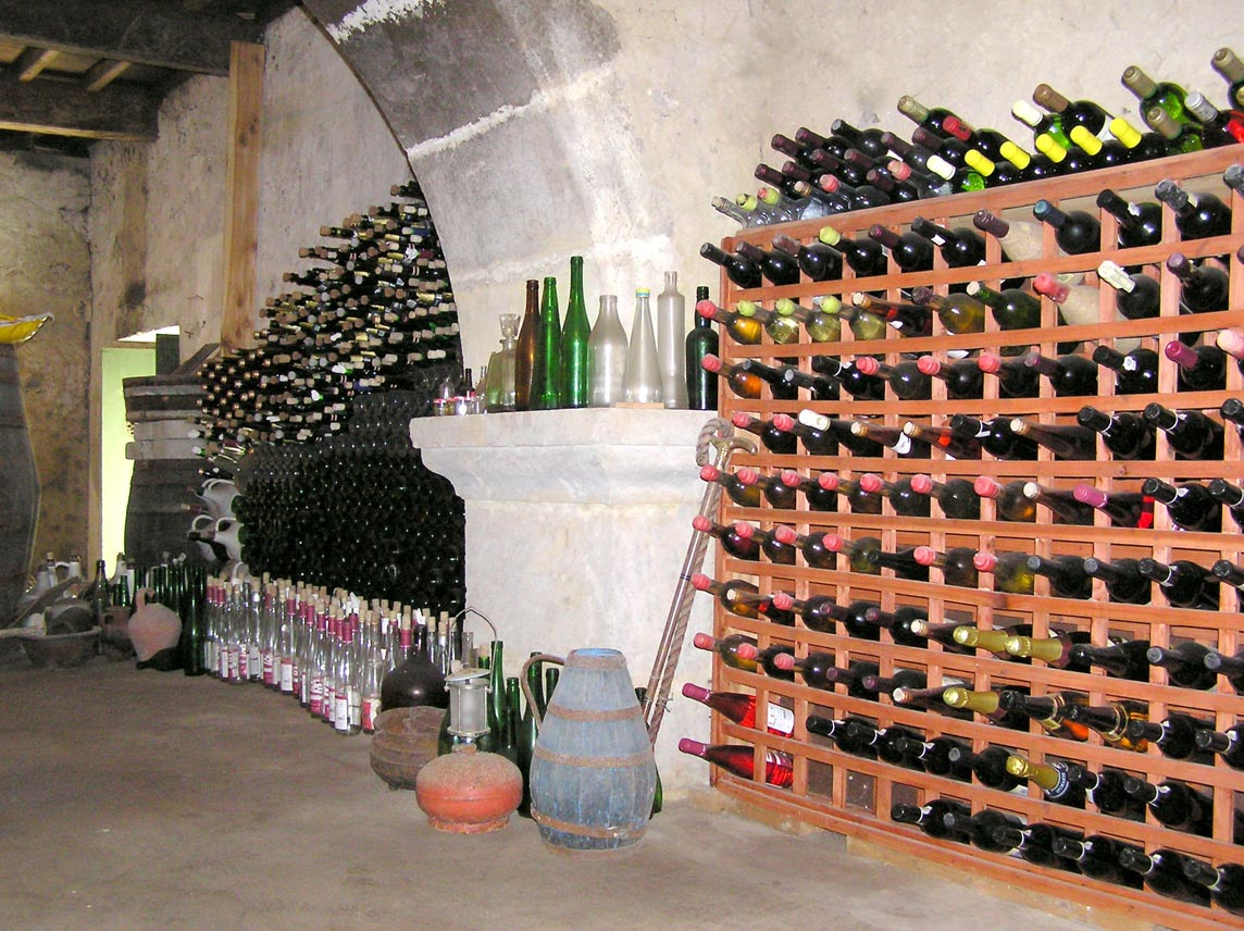 Villa Maria, Adega, Angra do Heroísmo, ilha Terceira, Açores, Portugal.